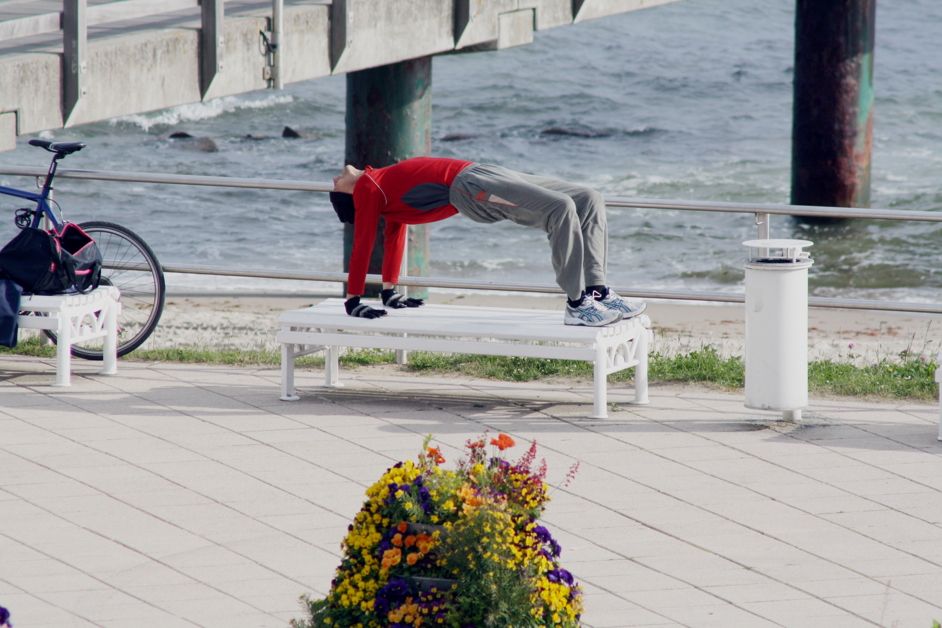 Kühlungsborn früher Morgen Yoga